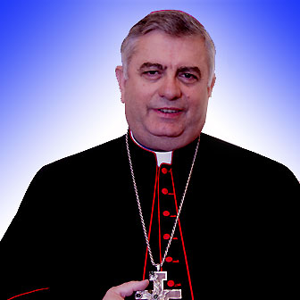 Jose Rodriguez Carballo, sekretarz Kongregacji ds. życia konsekrowanego etc.